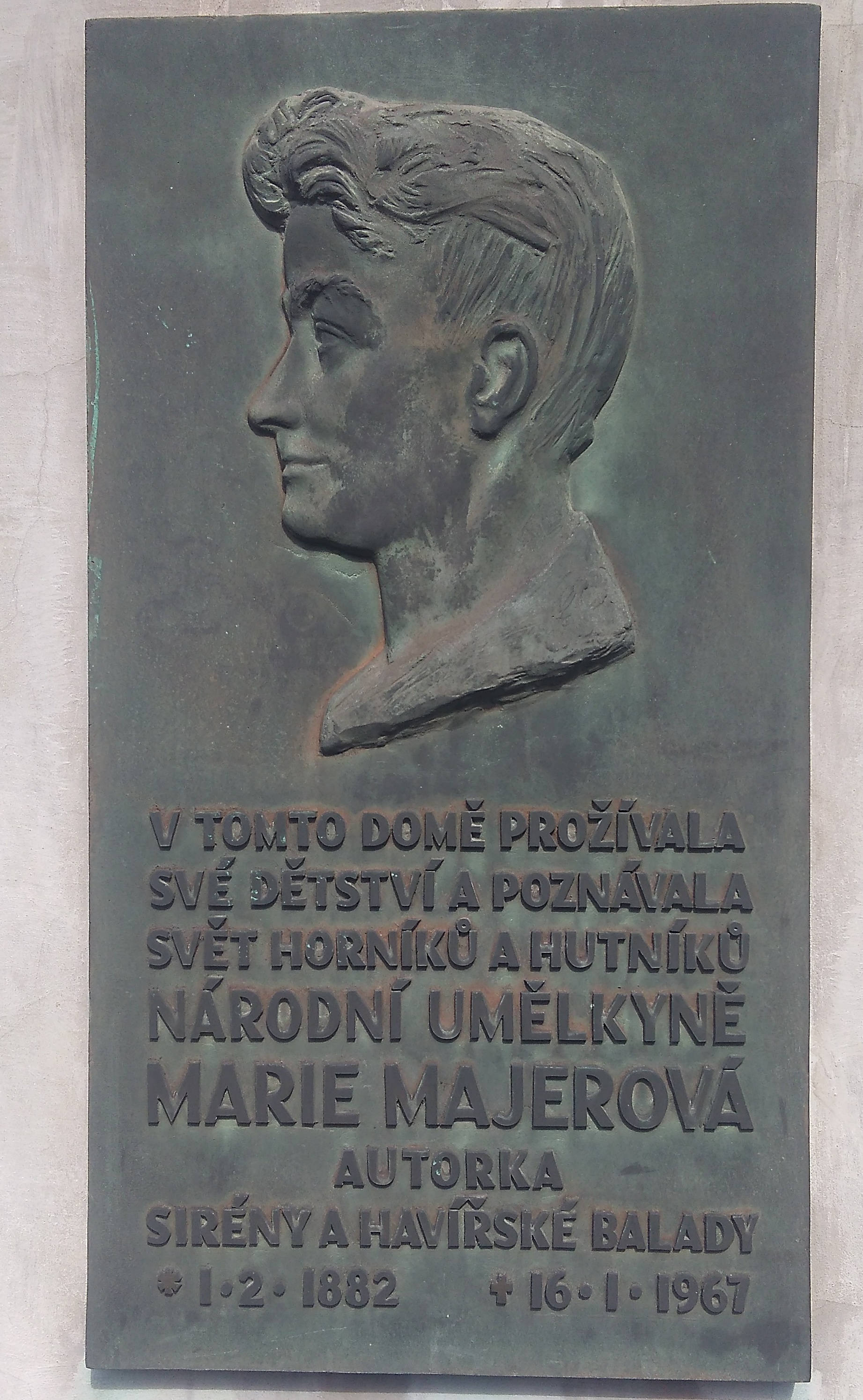 pamětní deska Marie Majerové na dome čp. 207 v ulici M. Majerové v Kladně, kde prožila mládí